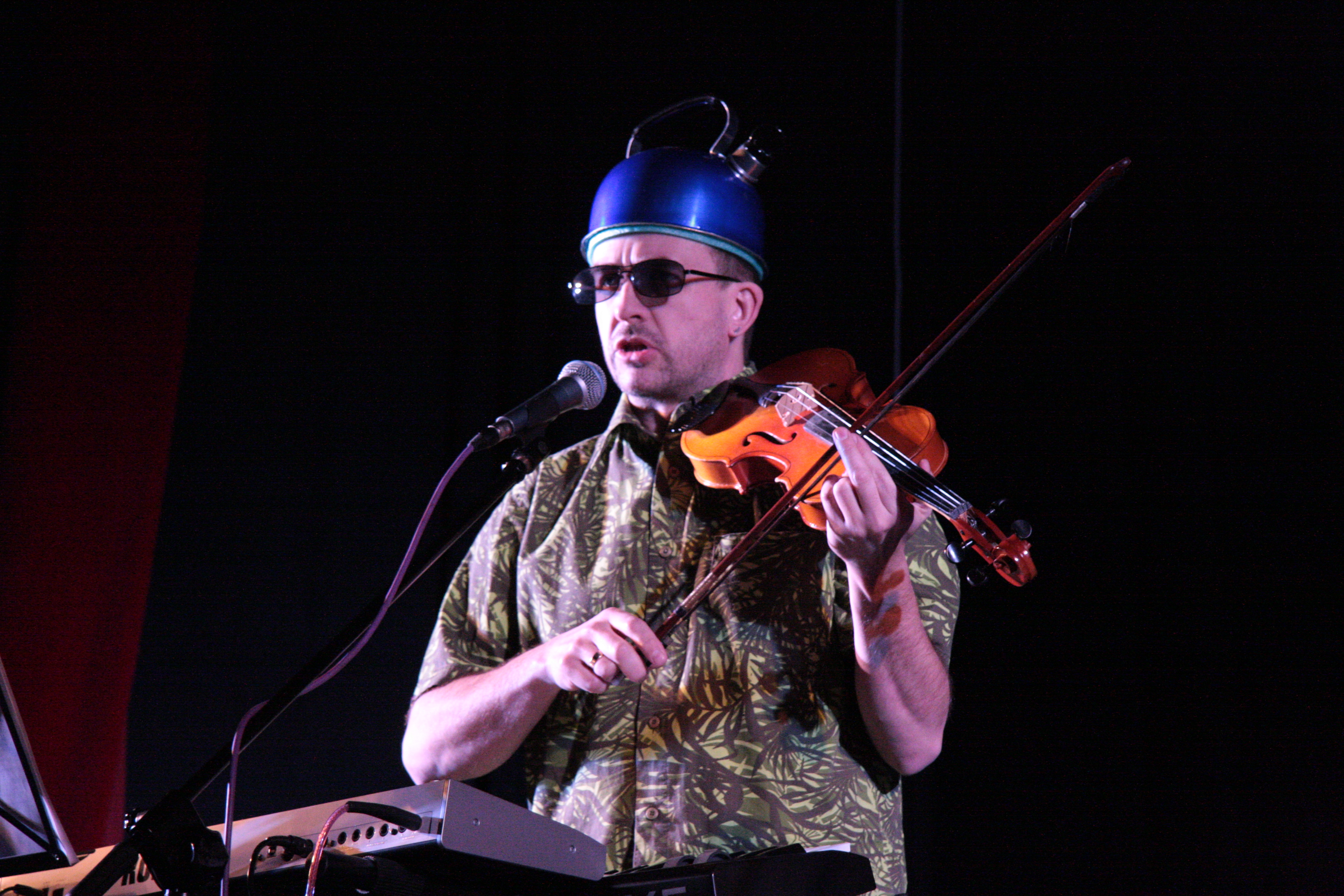 Mirosław Jędras, znany także jako ”Zacier” (ur. 25 sierpnia 1963 w Warszawie) – polski lekarz, a także muzyk, wokalista, autor tekstów, współtwórca i lider grupy muzycznej Zacier. Koncert w Warszawie 27.03.2008